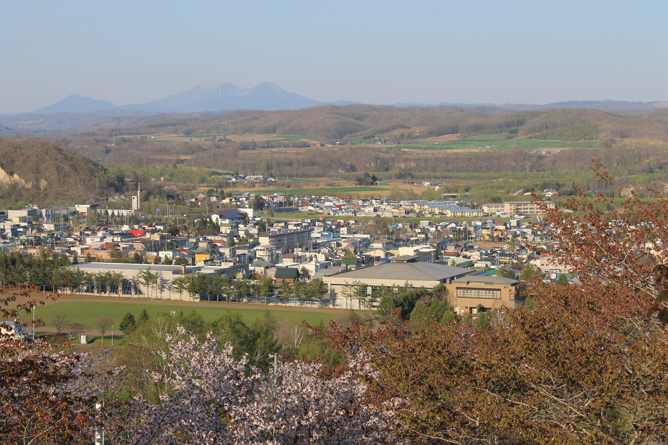 足寄町の風景